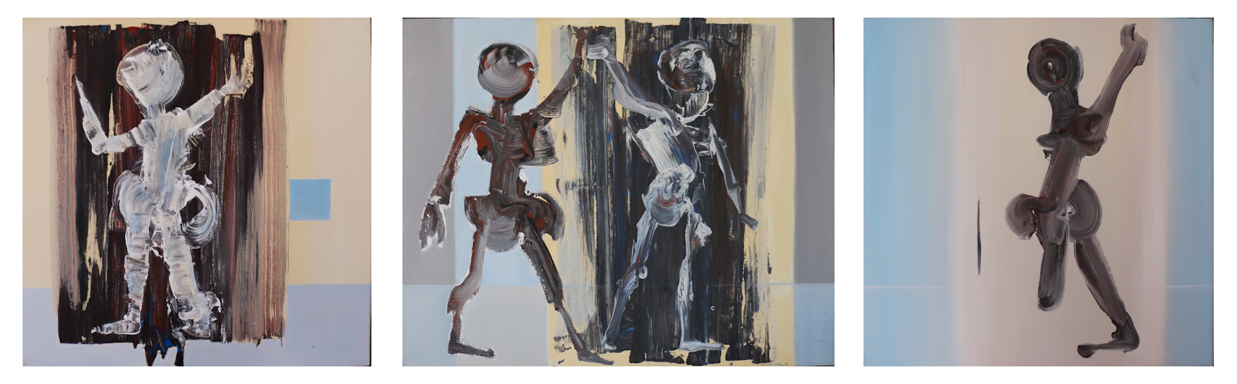 Acryl auf Leinwand links: 80 cm x 80 cm mittig: 80 cm x 100 cm rechts:80 cm x 80 cm